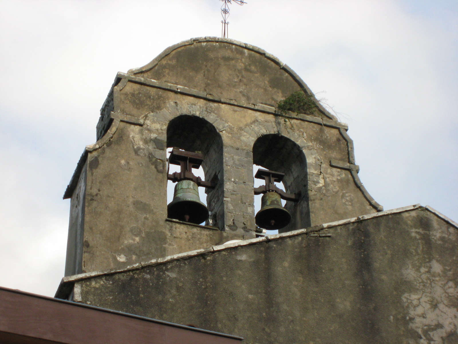 Clocher de l'église de Saint Laurent de Gosse (Landes (département)) (Pyrénées).